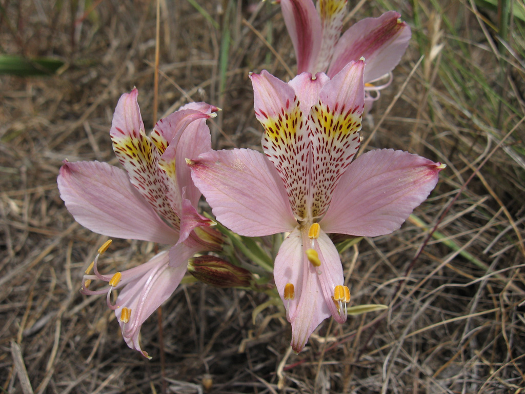 Lirio del campo (Alstroemeria hookeri), alstromerias